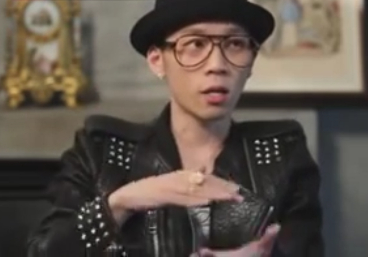 생전 백지연의 피플인사이드에 출연했던 임윤택